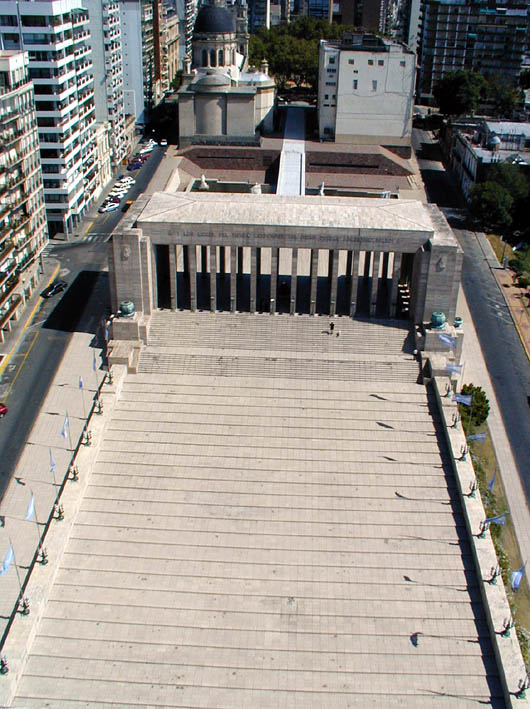 View of the Propylaeum and steps of the National Flag Memorial, in Rosario, Argentina.